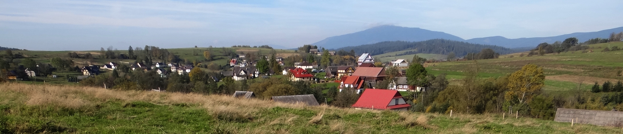 Panorama miejscowości Podsarnie